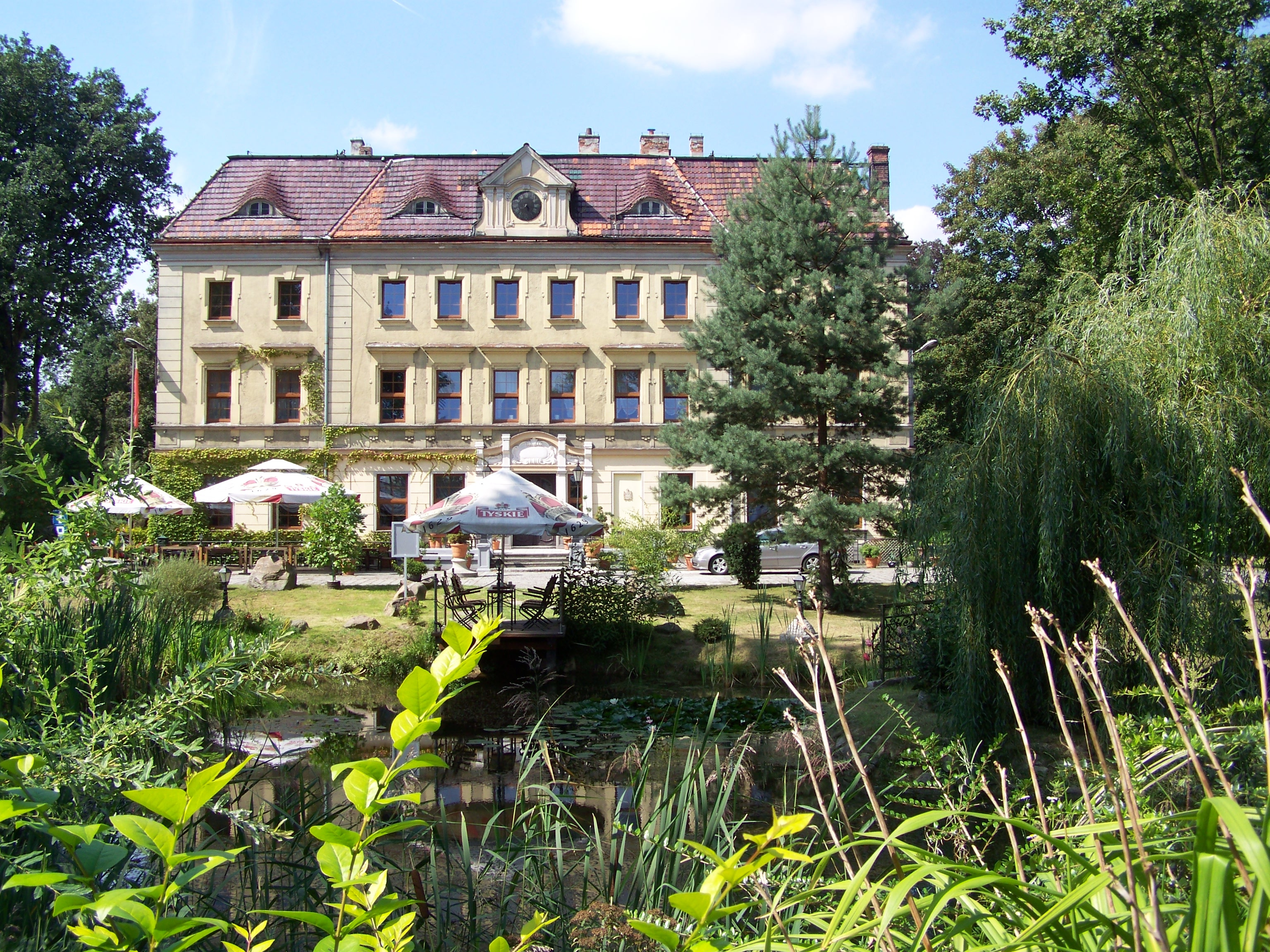 Wojnowice - pałac z zewnątrz